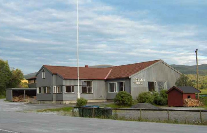 Volden skole, Verdal, 2008